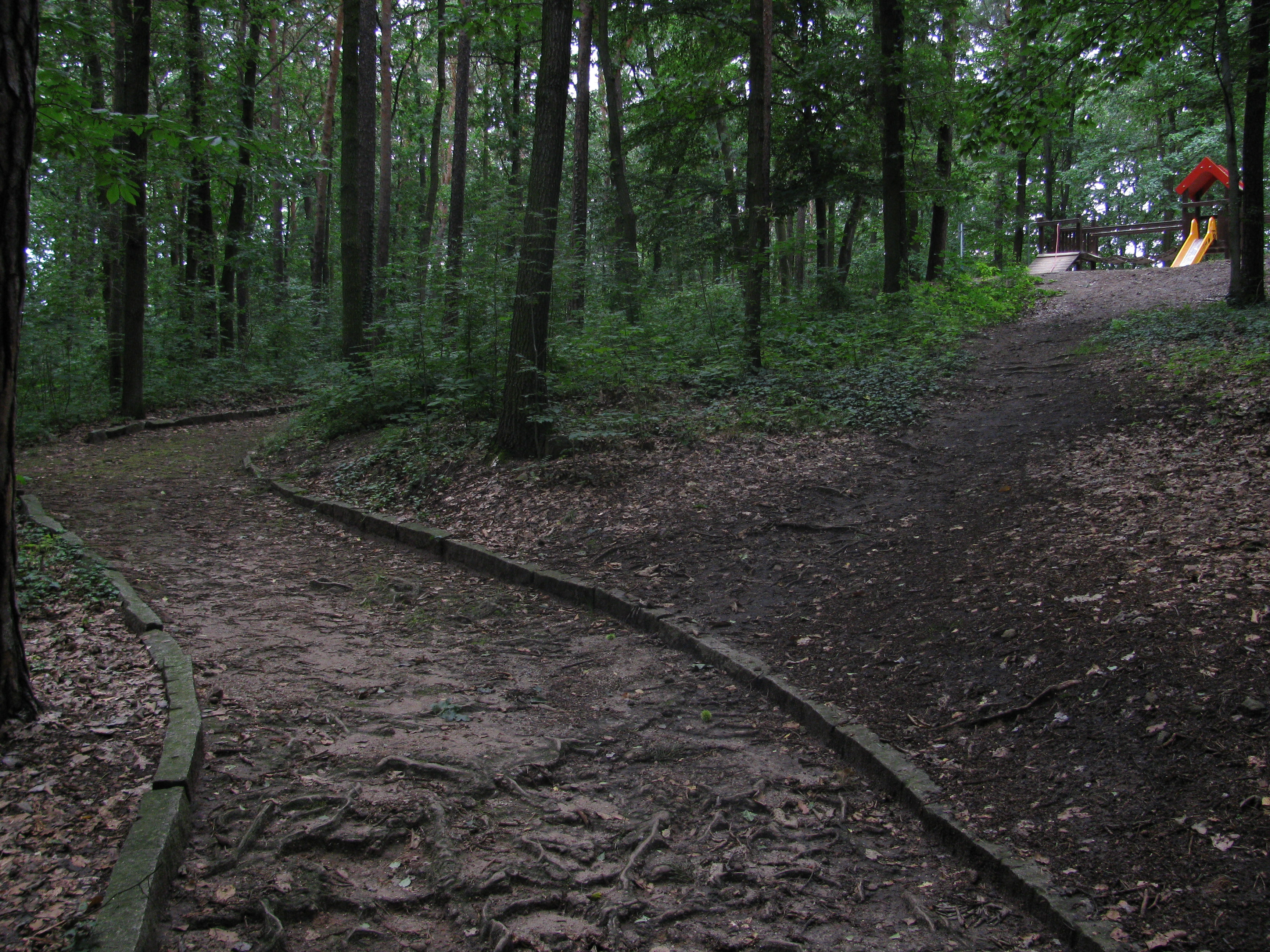 Kurpark in Buchholz, Friedewald, Moritzburg, Sachsen